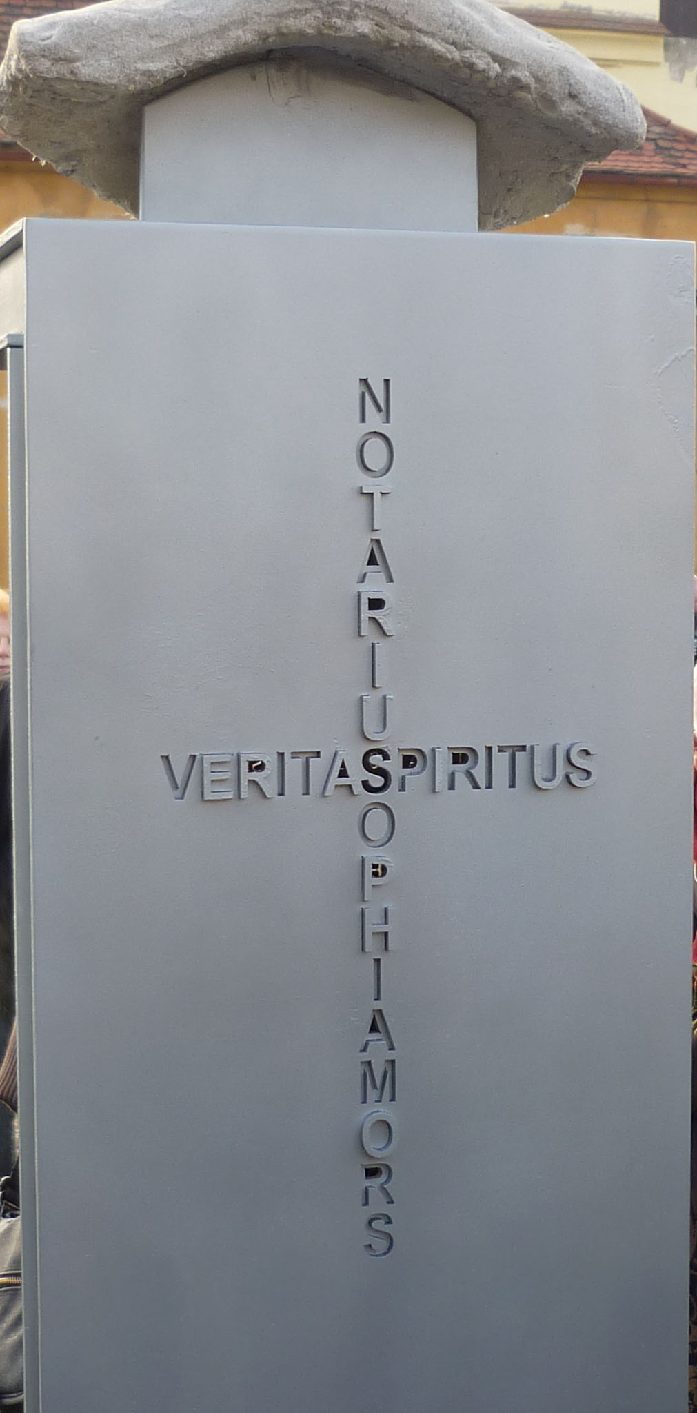 Rückseite der Gedenkstele für Johannes von Saaz